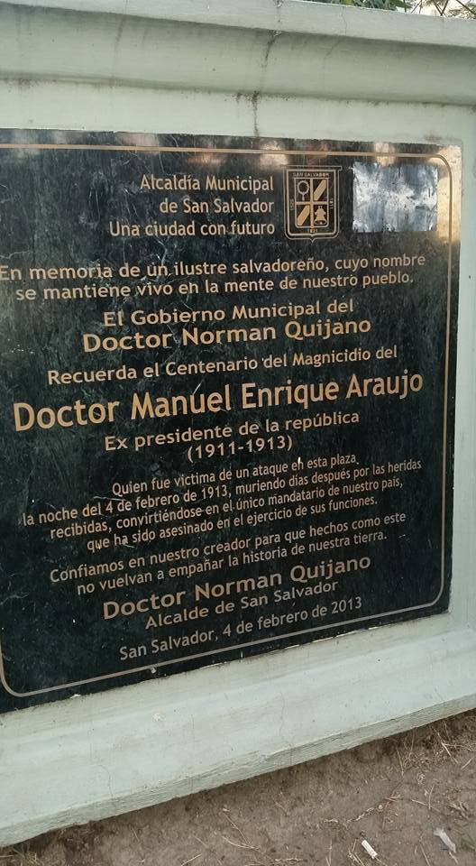 Placa conmemorativa que describe el magnicidio.